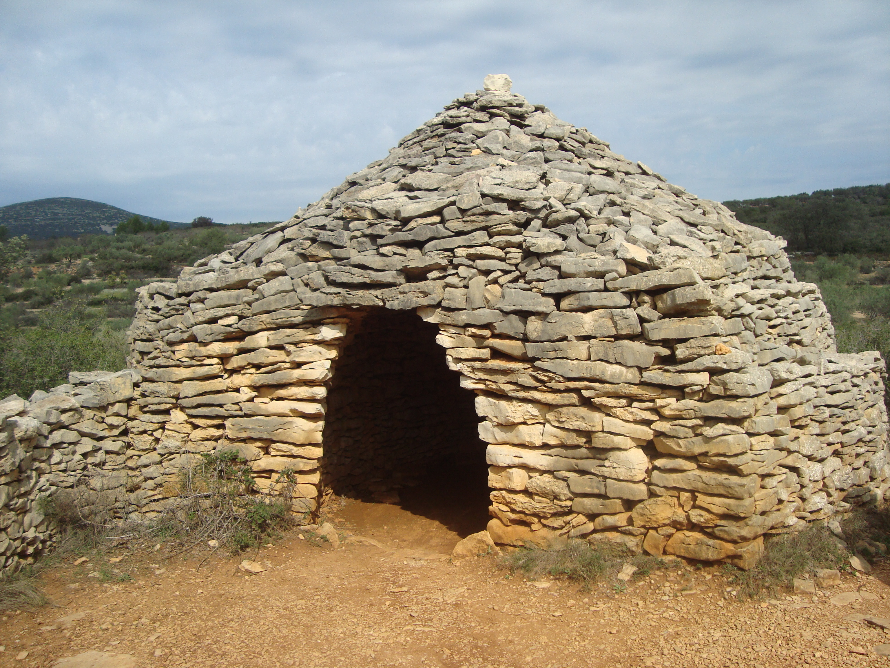 Cabaña de piedra, barraca, Maestrazgo, Castellón